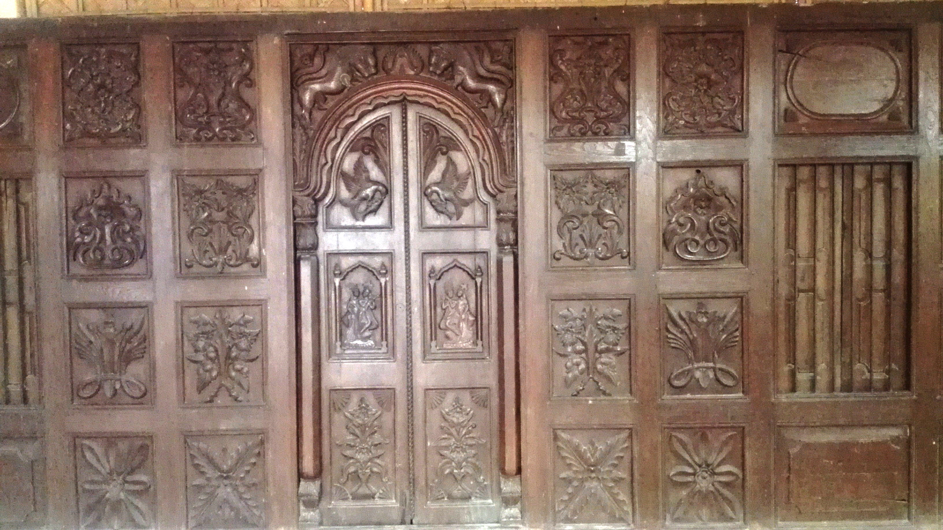 সোনারগাঁও যাদুঘর